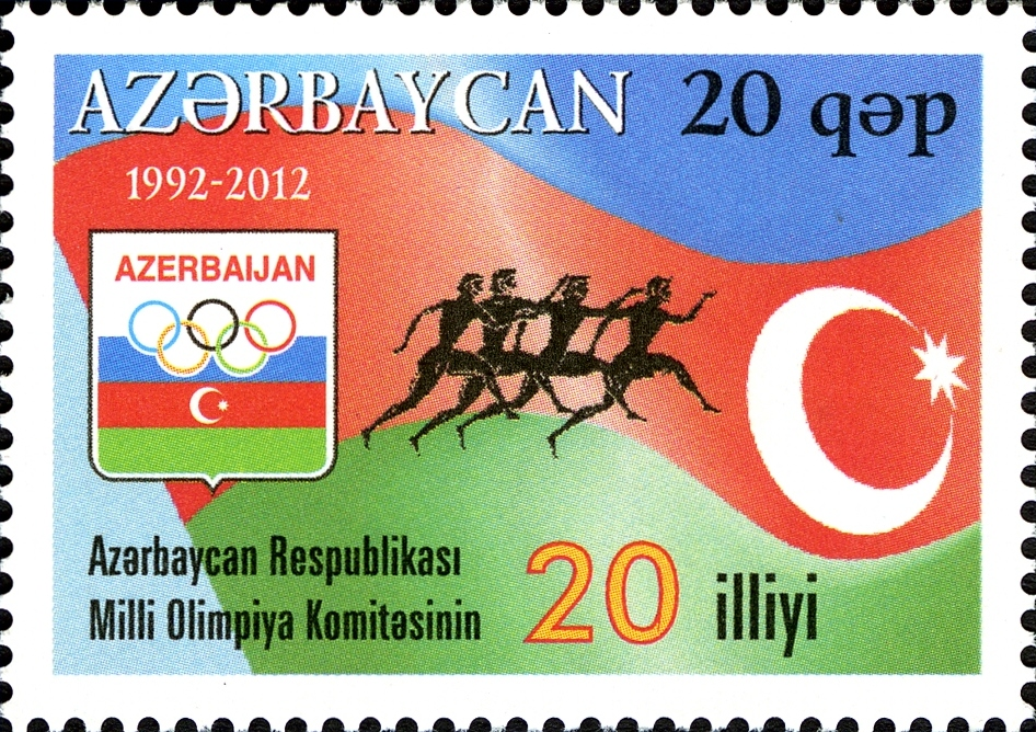 Azərbaycan Respublikası Milli Olimpiya Komitəsinin 20 illiyi